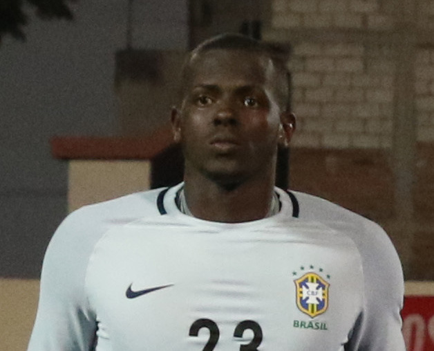 Riobamba, Ecuador, 18 enero 2017 (Andes).- El combinado ecuatoriano dirigido por Javier Rodríguez cayó 1-0 este miércoles ante Brasil en el marco de la primera jornada del Grupo A del Campeonato Sudamericano Sub 20 Ecuador 2017, durante el partido jugado en el estadio Olímpico de Riobamba (centro andino), abarrotado de hinchas. ANDES/Micaela Ayala V.